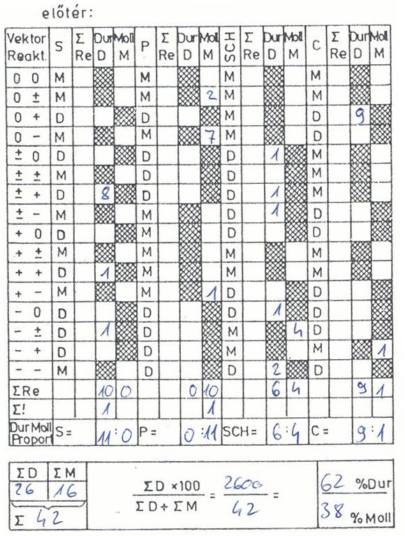 Szondi-teszt, saját tesztfelvétel, a vsz. engedélyével